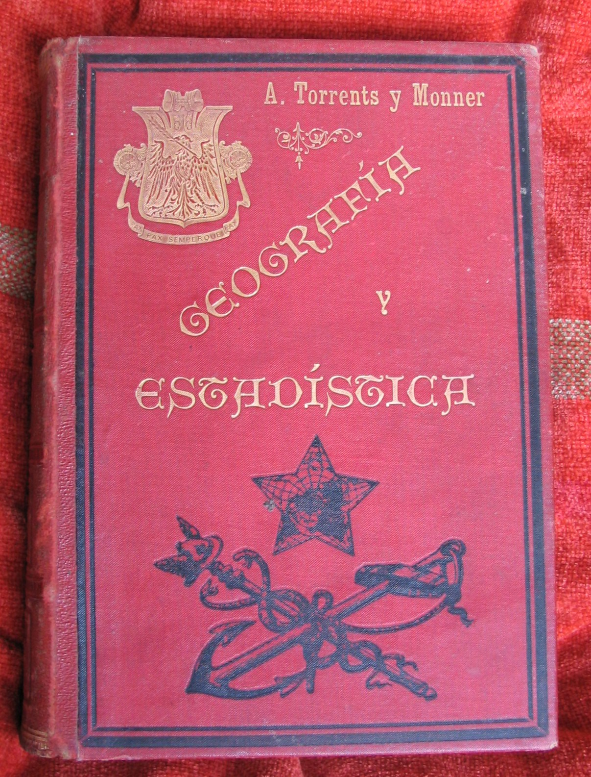 Portada de Torrents y Monner, Antonio (1900 ca), Geografía y estadística económico-industrial